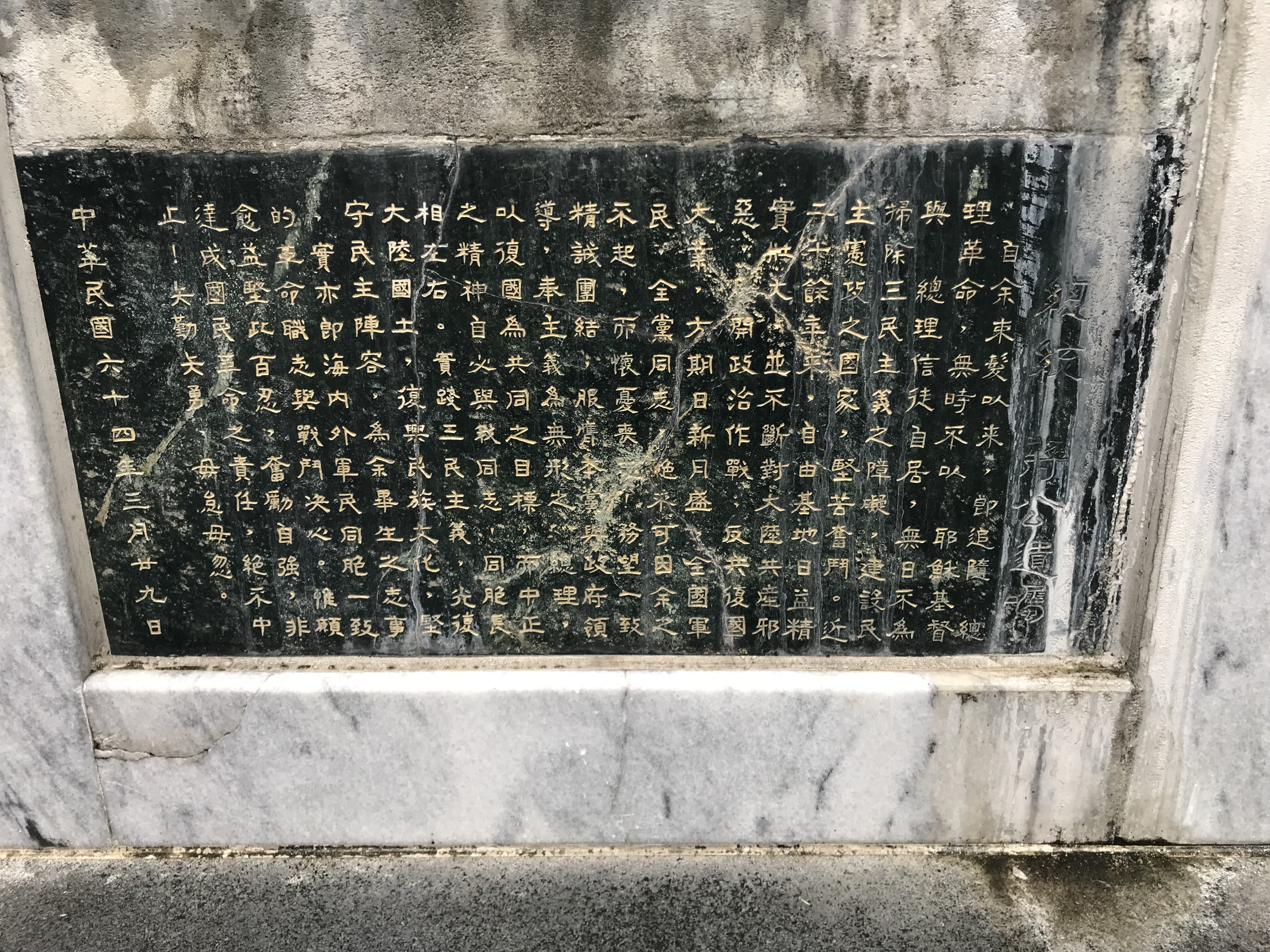 臺北市文山區興隆公園蔣中正銅像基座正面下方所刻蔣中正遺囑全文